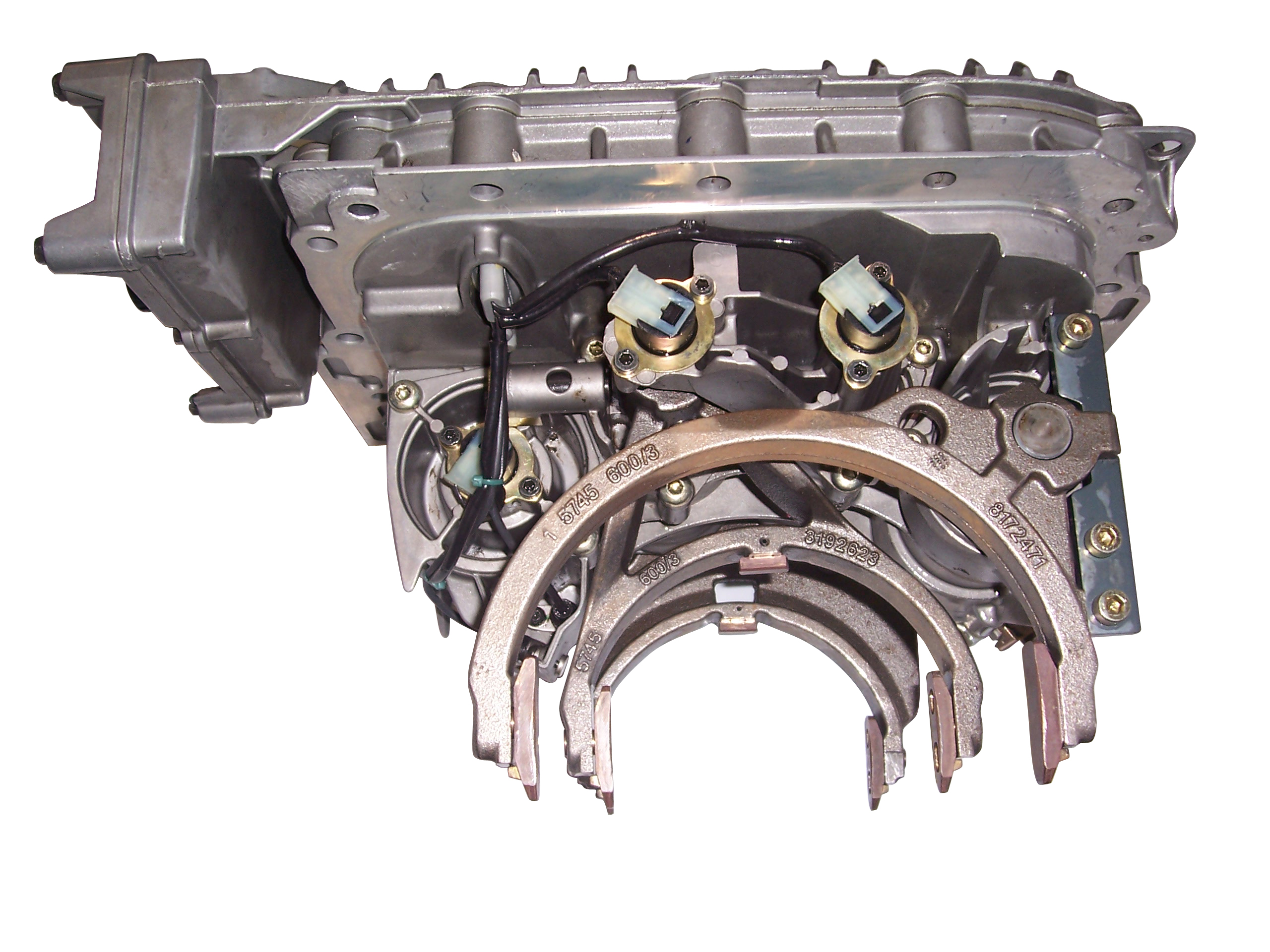 truck semi_automatic electronic pneumatic gear shift control unit